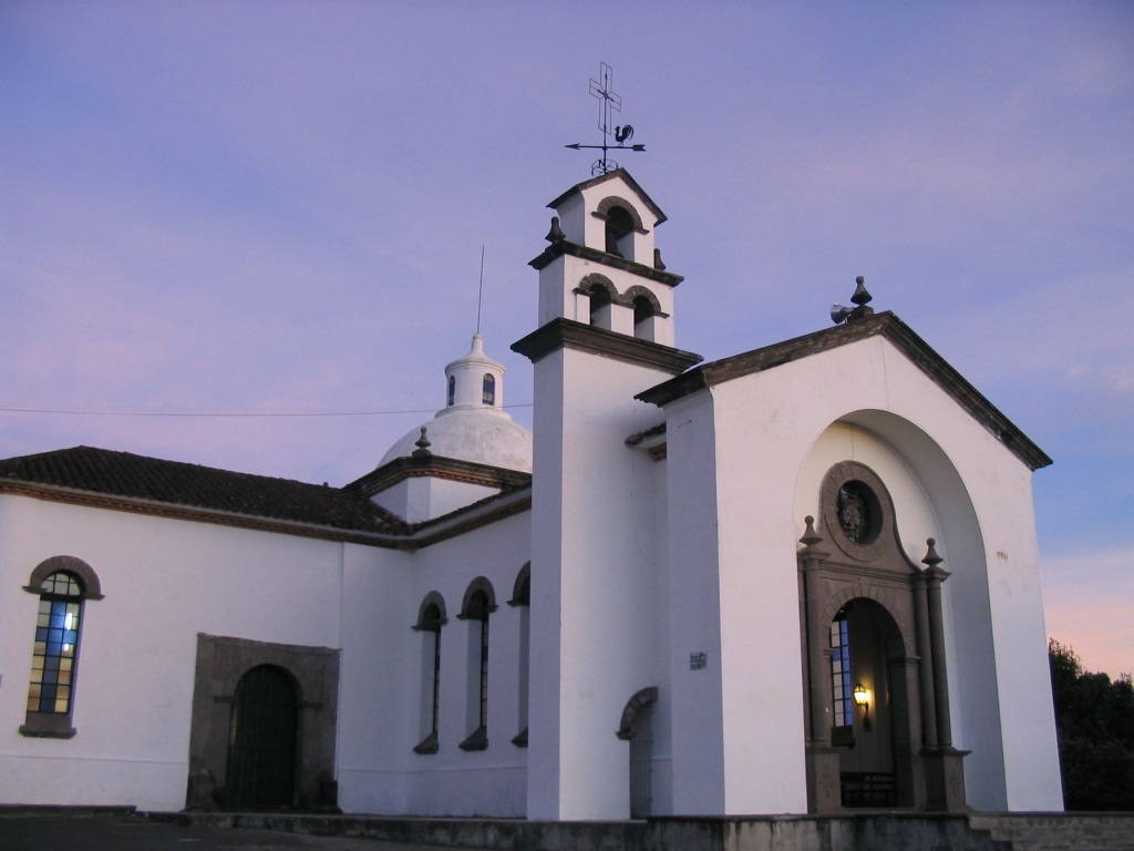 Santuario de Belén, ubicado en Popayán (colombia). Foto Tomada Por: Leonardo Pupiales M. donde se casaran buurito y lulu